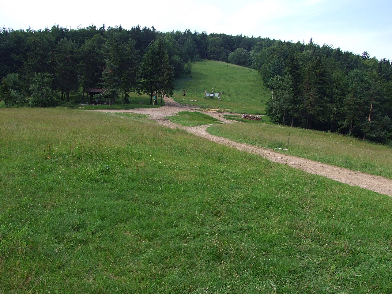 Sucha Przełęcz (Beskid Makowski)